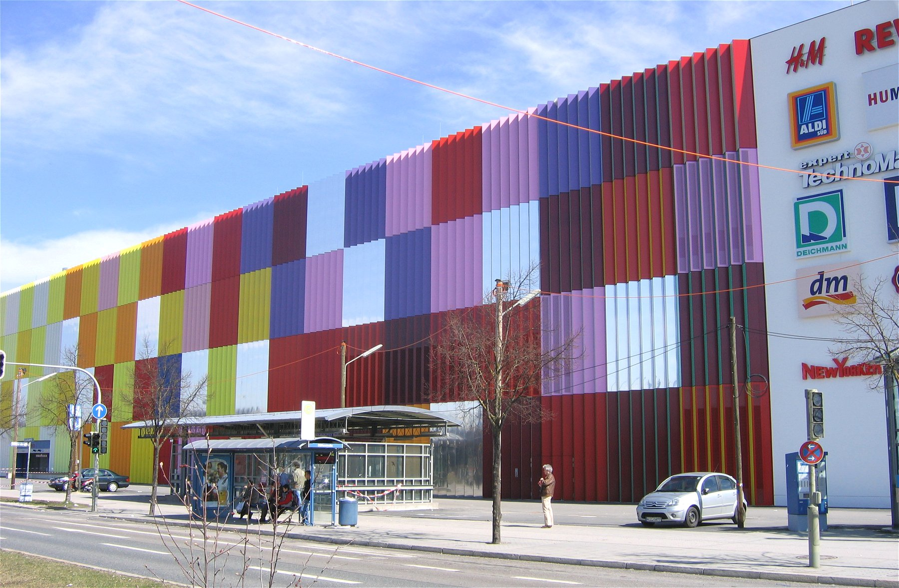 Einkaufszentrum Mira in München Nordheide.